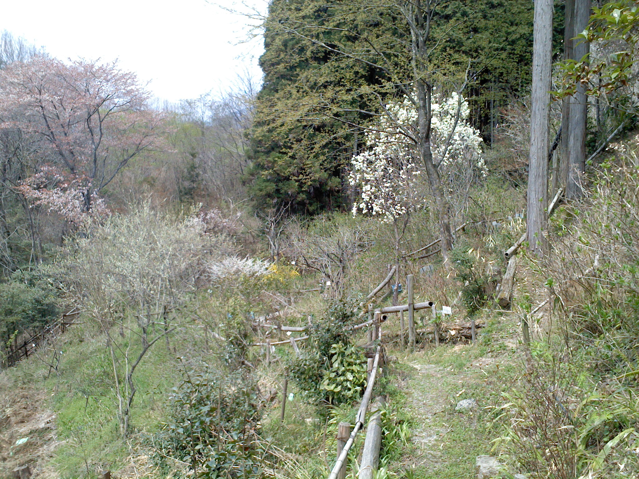 如意ヶ嶽・池ノ谷薬草園